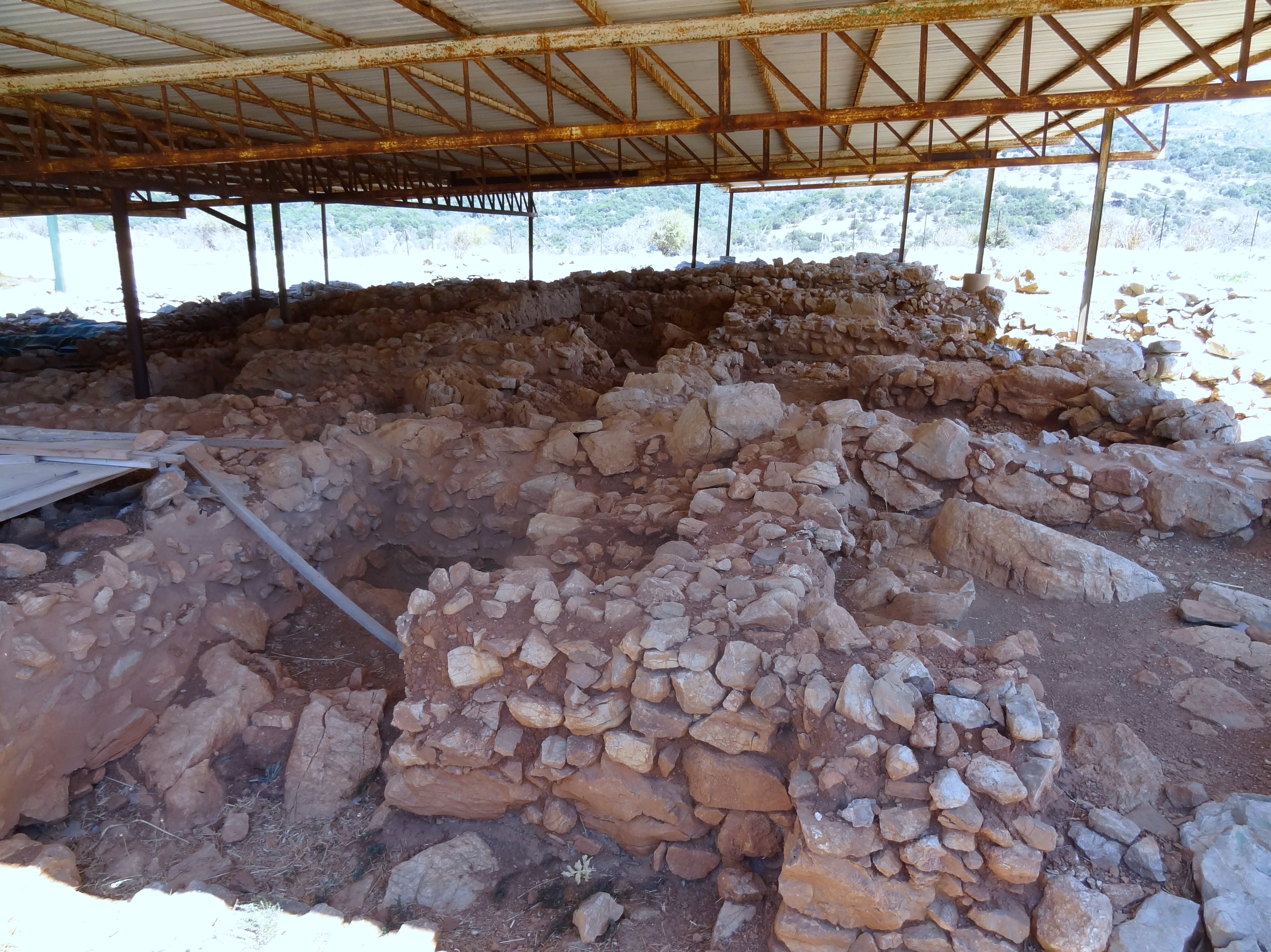 Archäologische Ausgrabungsstätte von Monastiraki (Μοναστηράκι), Gemeinde Amari, Regionalbezirk Rethymno, Kreta, Griechenland